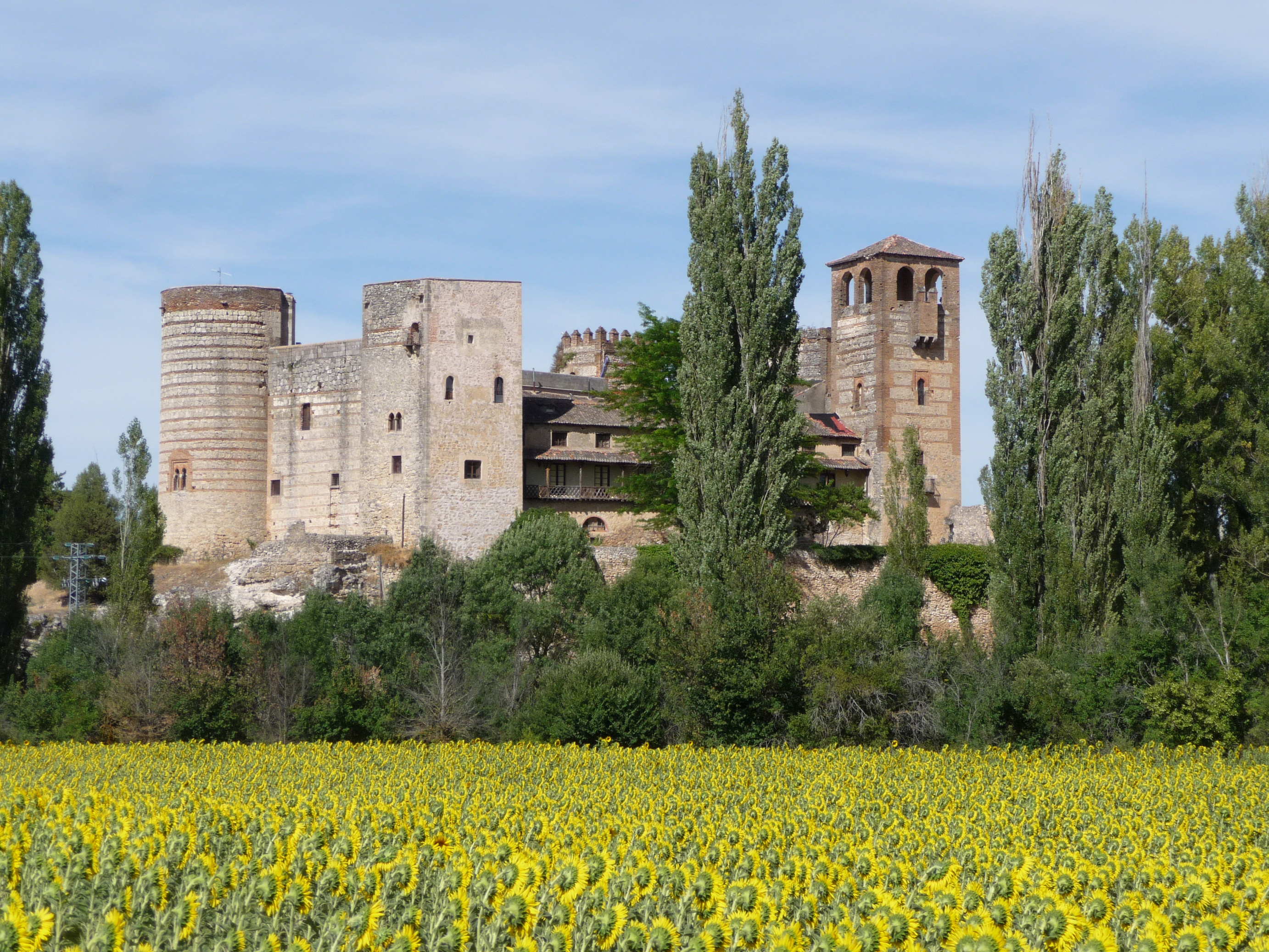 Castillo de Castilnovo visto desde la carretera